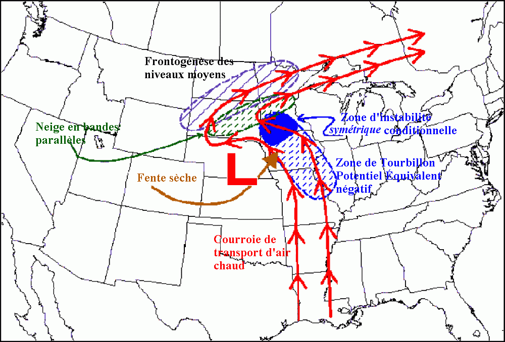 Positions des zones d'instabilité symétrique conditionnelle dans une dépression.